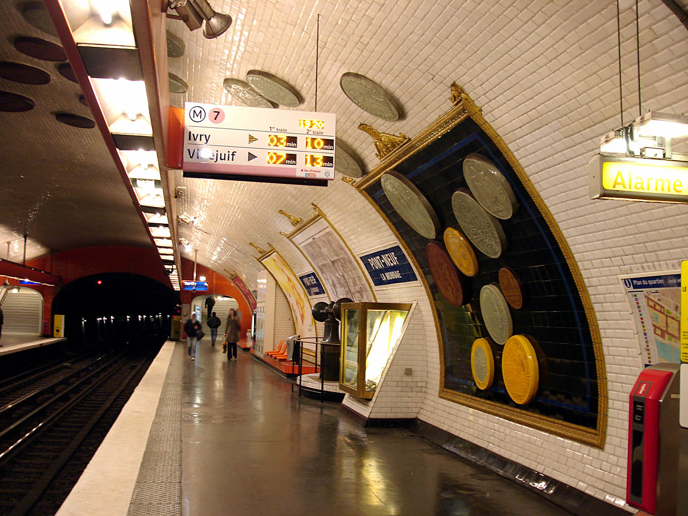 Station Pont Neuf de la ligne 7 du métro de Paris, France.